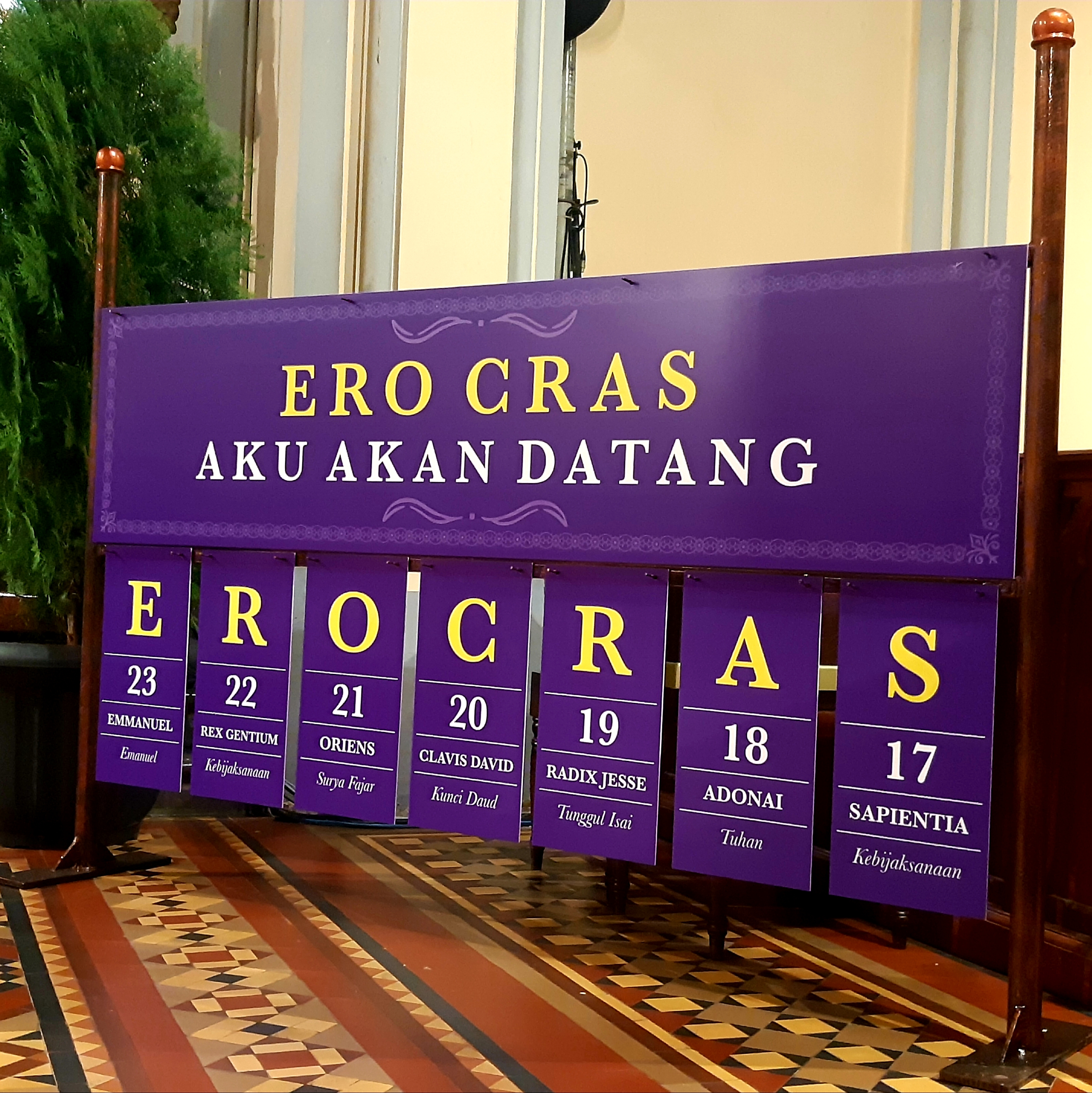 Akrostik Ero Cras di Katedral Jakarta